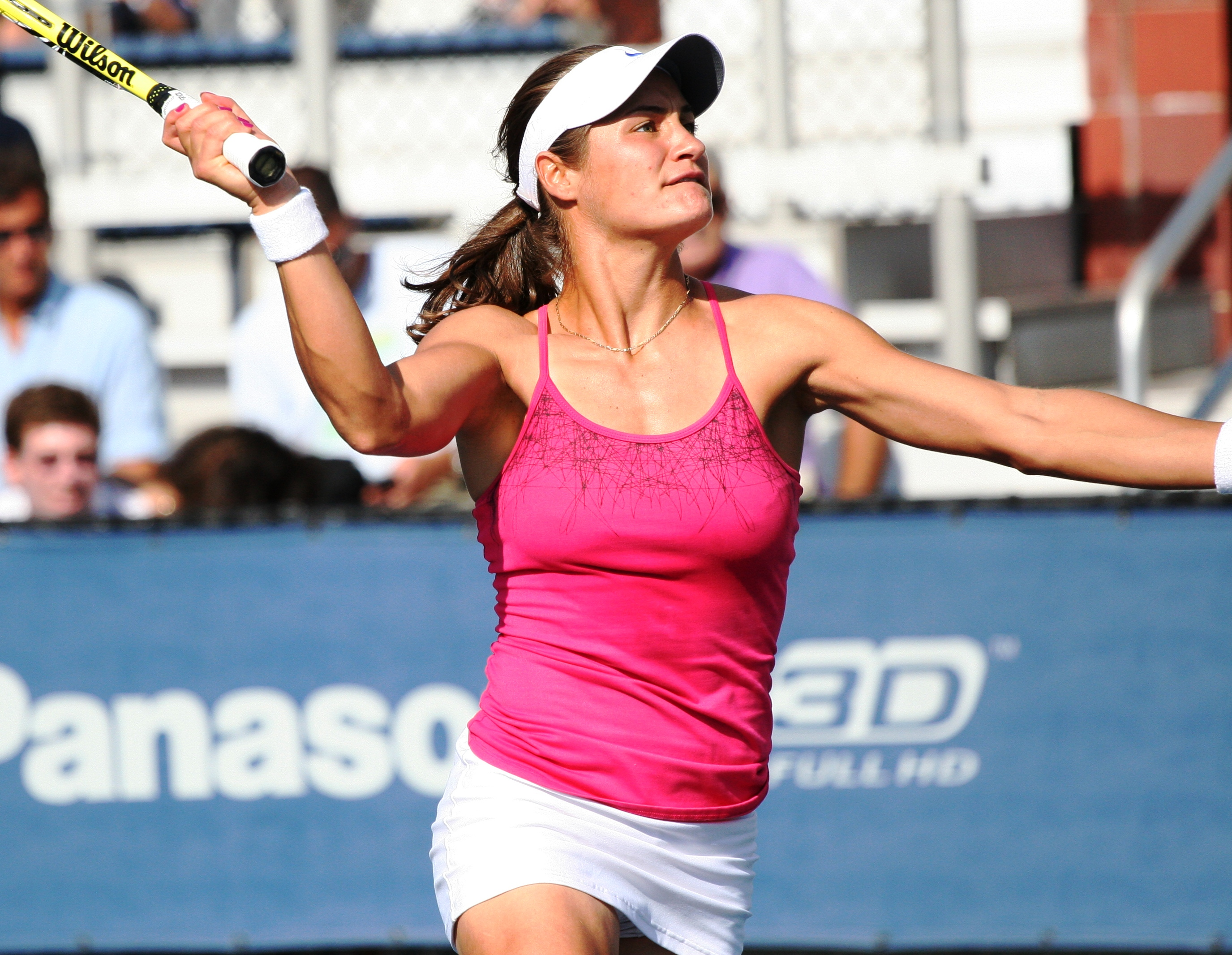 U.S. Open Saturday, Sept. 4, 2010